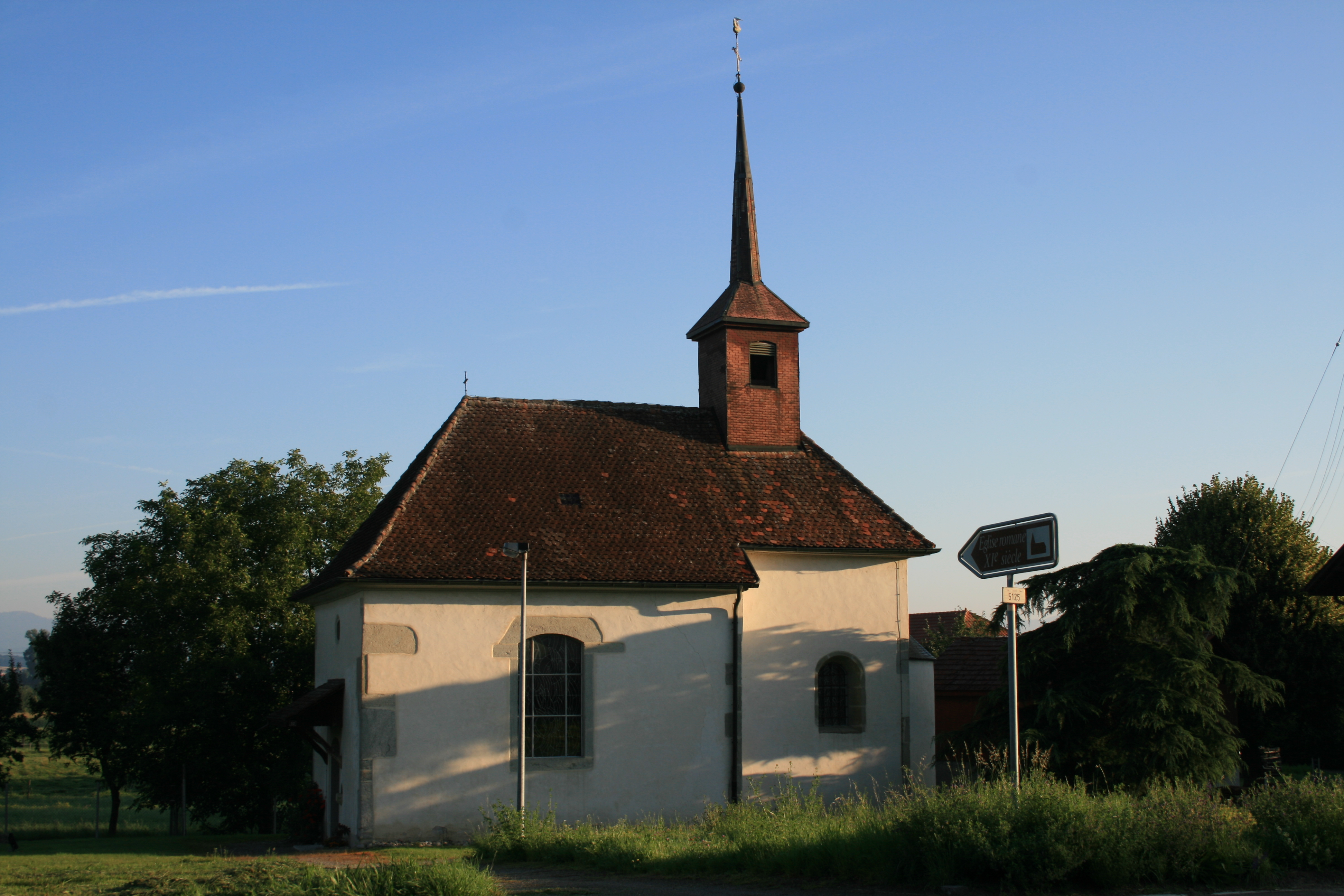 Chapelle à Domdidier FR, Suisse